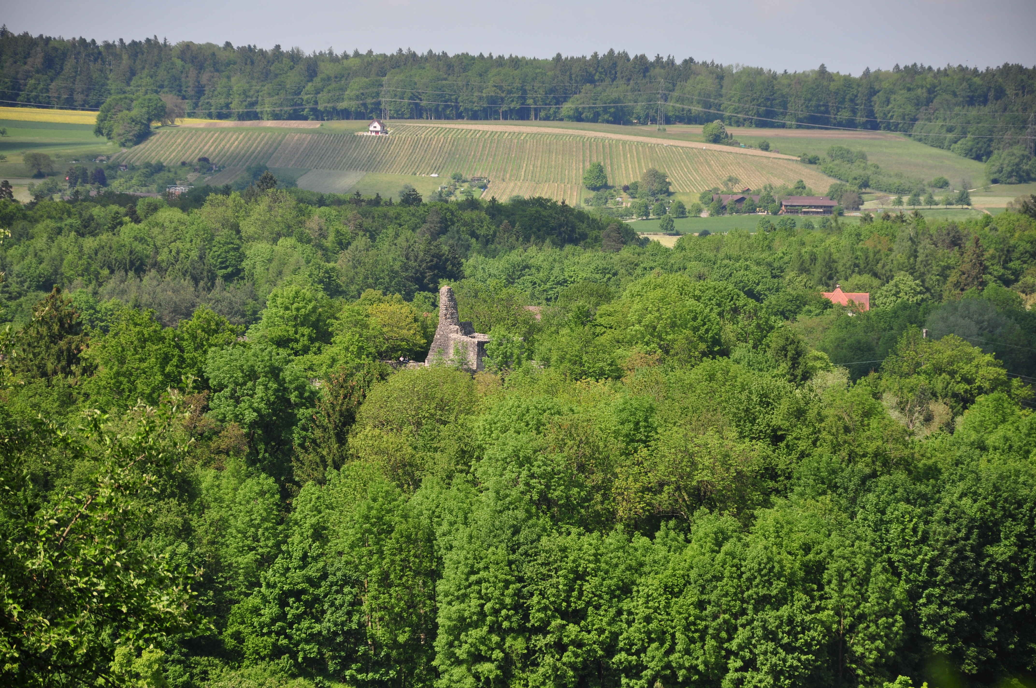 Altburg (Alt-Regensberg) in Regensdorf (Switzerland)